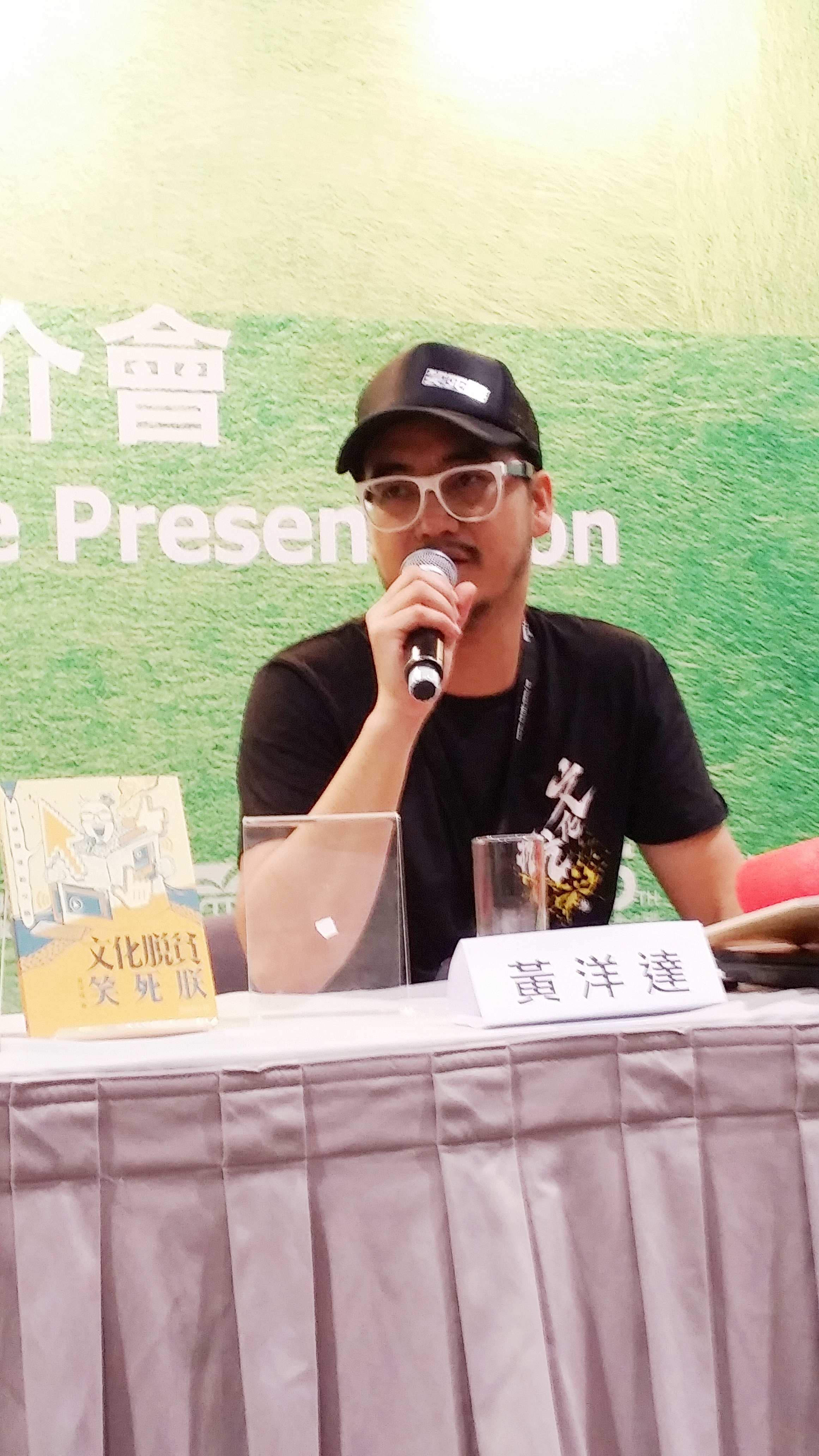 黃洋達在2014年香港書展新書推介會